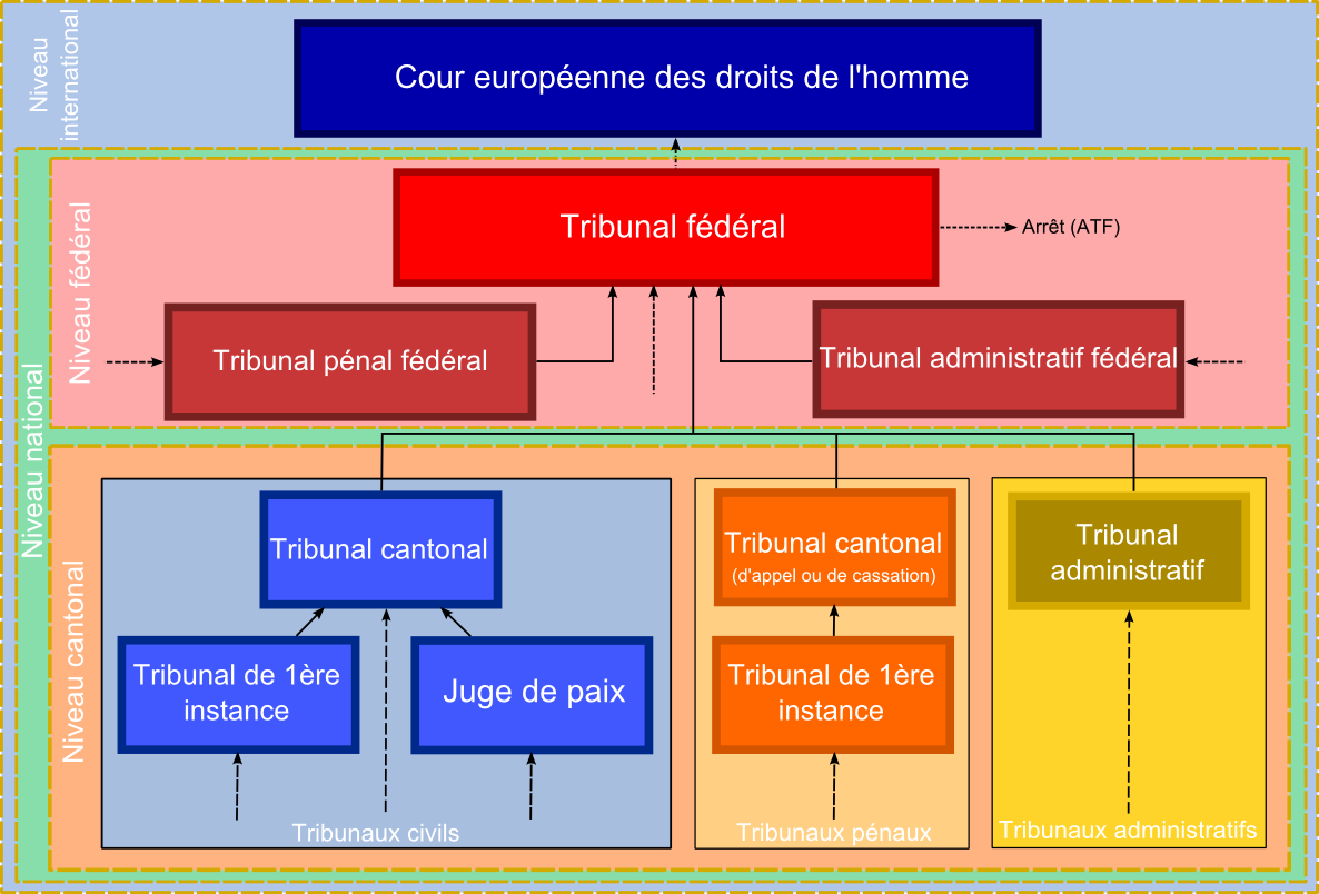 Organigramme simplifé du système judiciaire suisse